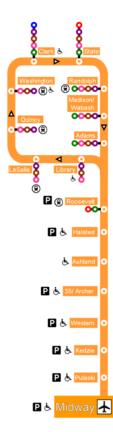 Plan de la ligne orange du mégtrod e chicago